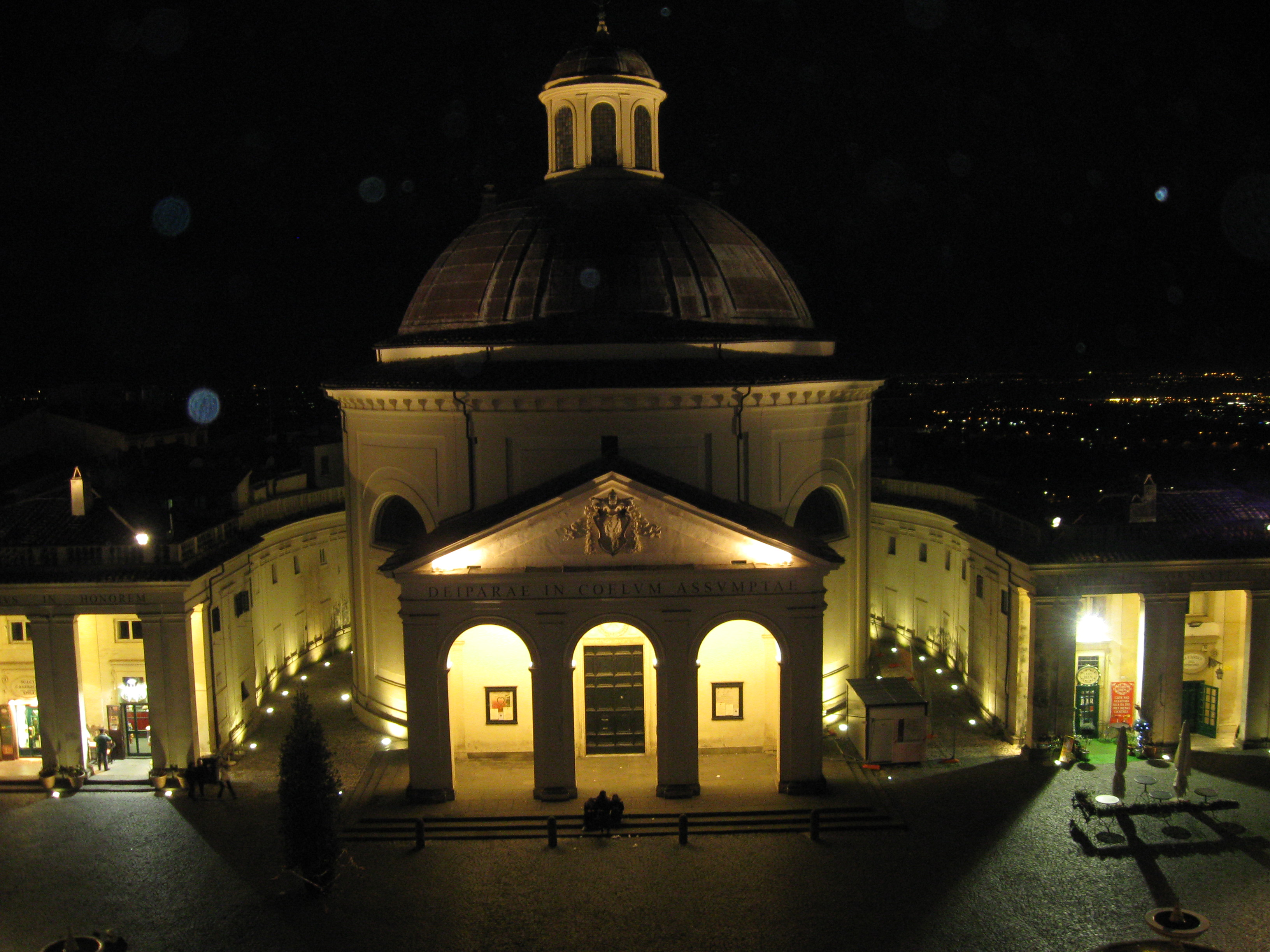 L'esterno della Collegiata di Santa Maria Assunta ad Ariccia (RM) dall'ultimo piano di Palazzo Chigi